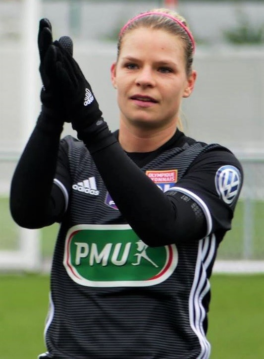 Eugénie Le Sommer le 11 février 2018 en Coupe de France contre Toulouse FC. Elle bat, durant ce match, le record de buts de Lotta Schelin, avec 226 unités contre 225 pour la suédoise.